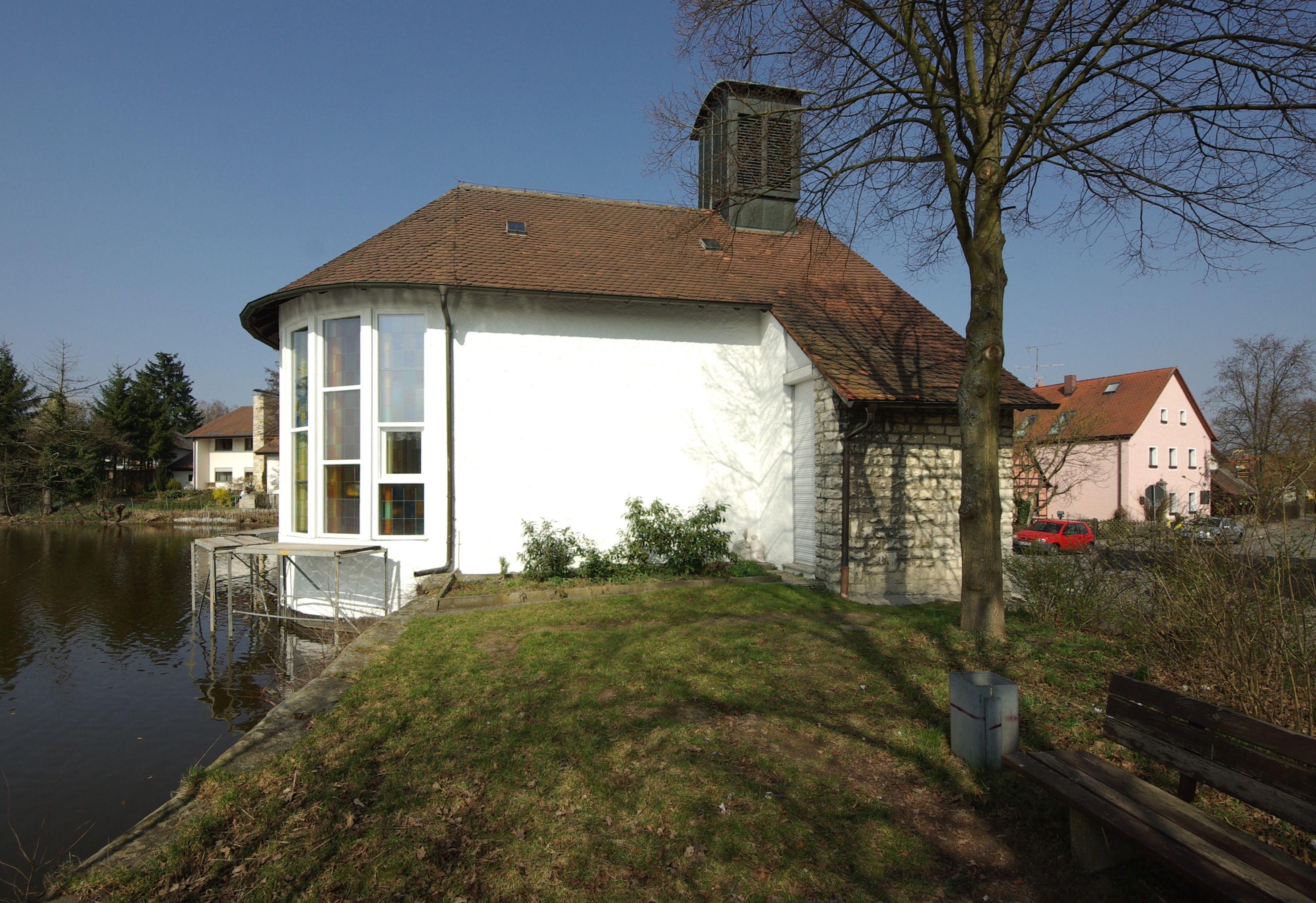 Die 1954 bis 1964 errichtete St. Josefs-Kapelle im Erlanger Stadtteil Kosbach